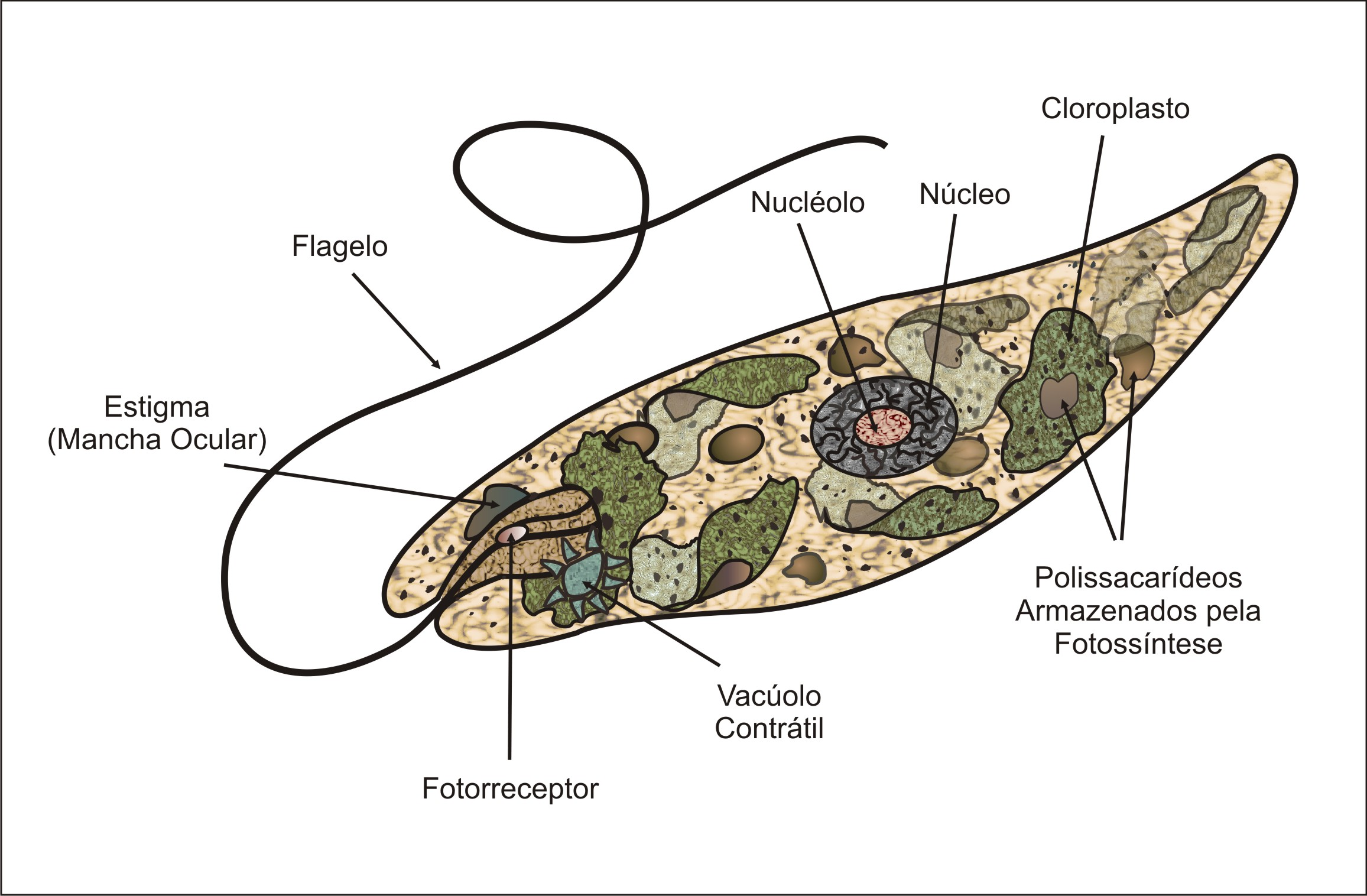 Diagrama básico da espécie euglena sp.